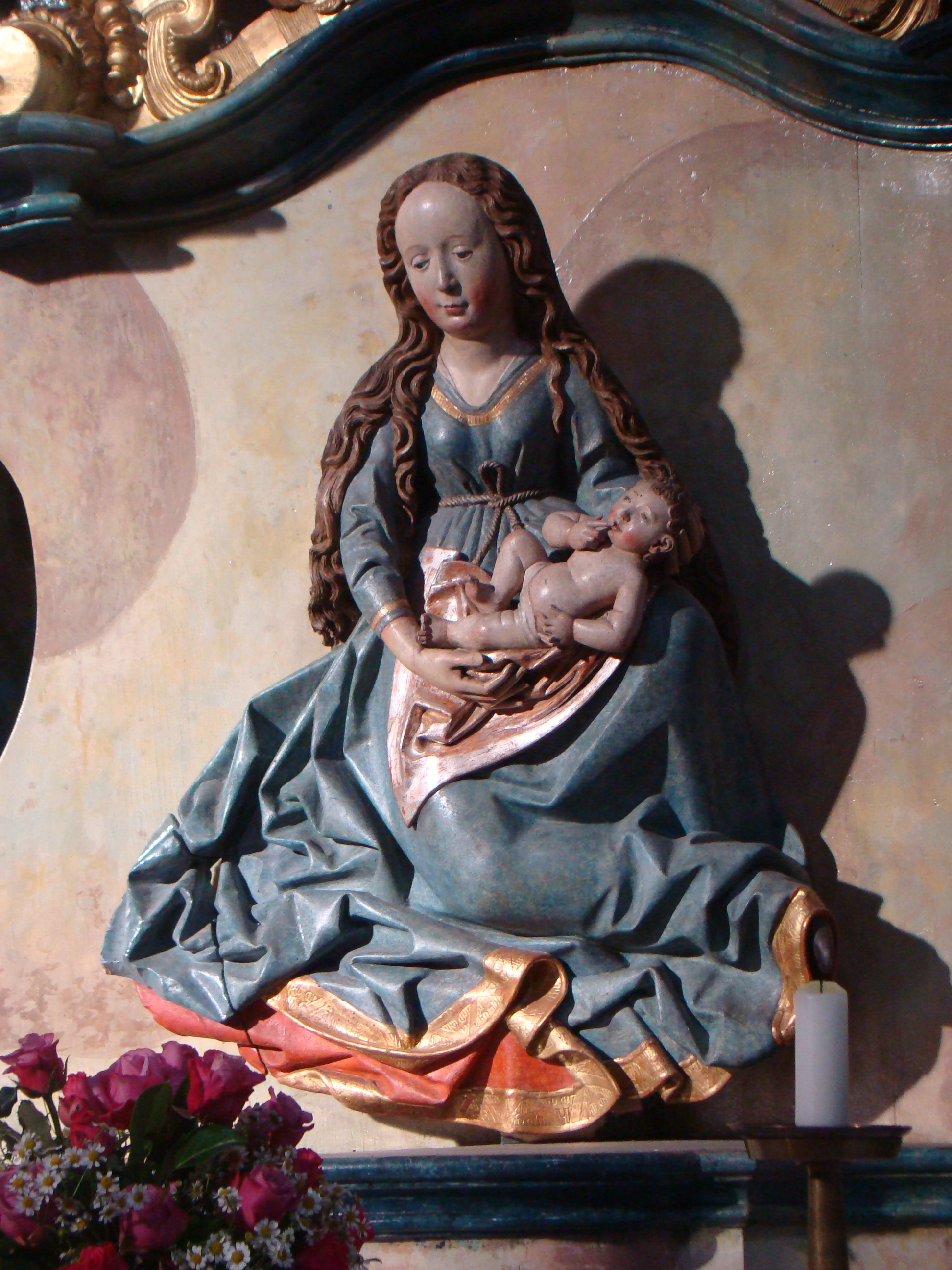 Dominikanerkirche in Bad Wimpfen